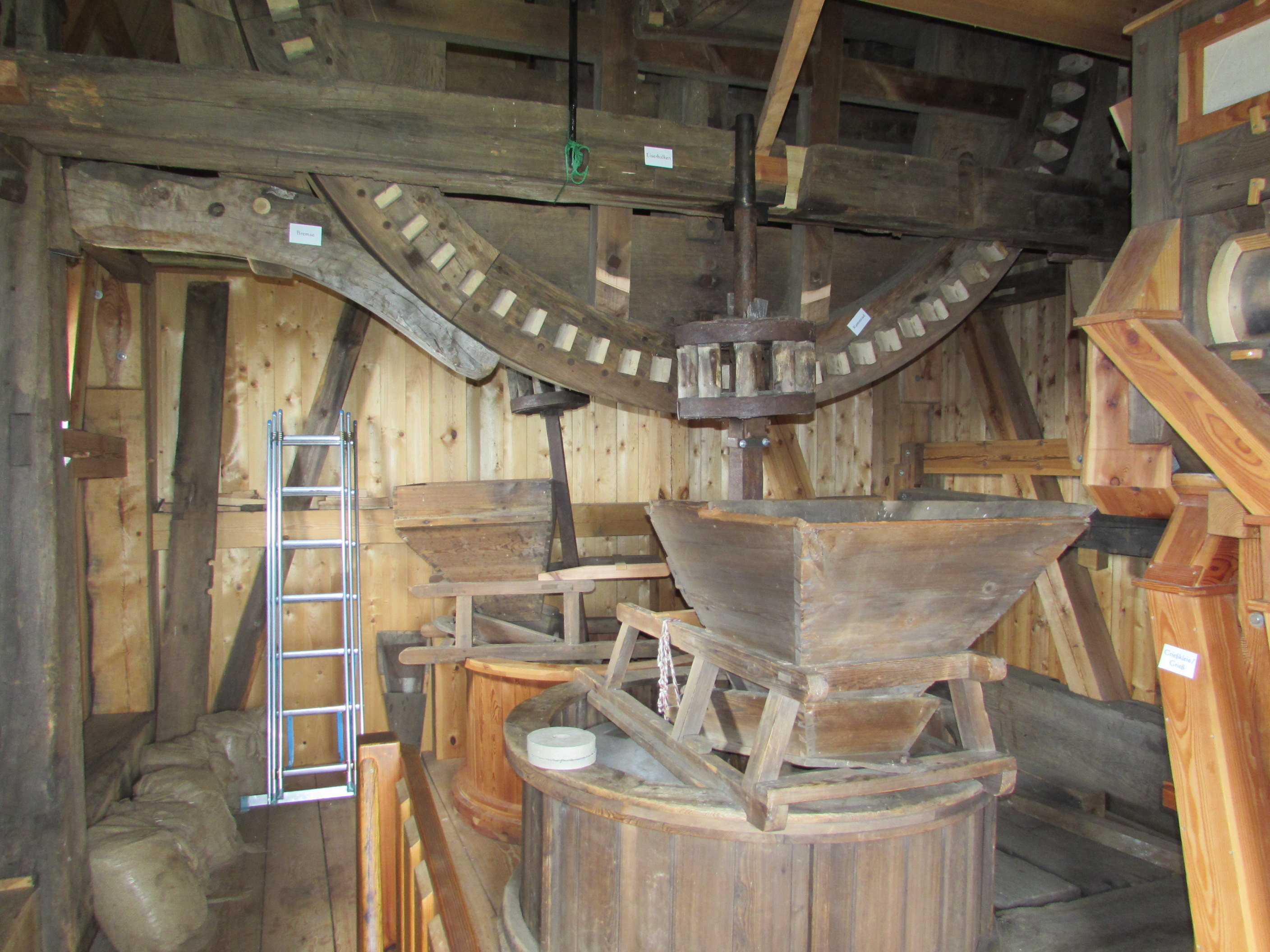 inneres der bockwindmühle ketzür